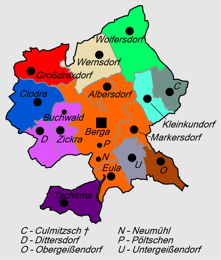 Gliederung der Stadt Berga/Elster ab 1. April 1959